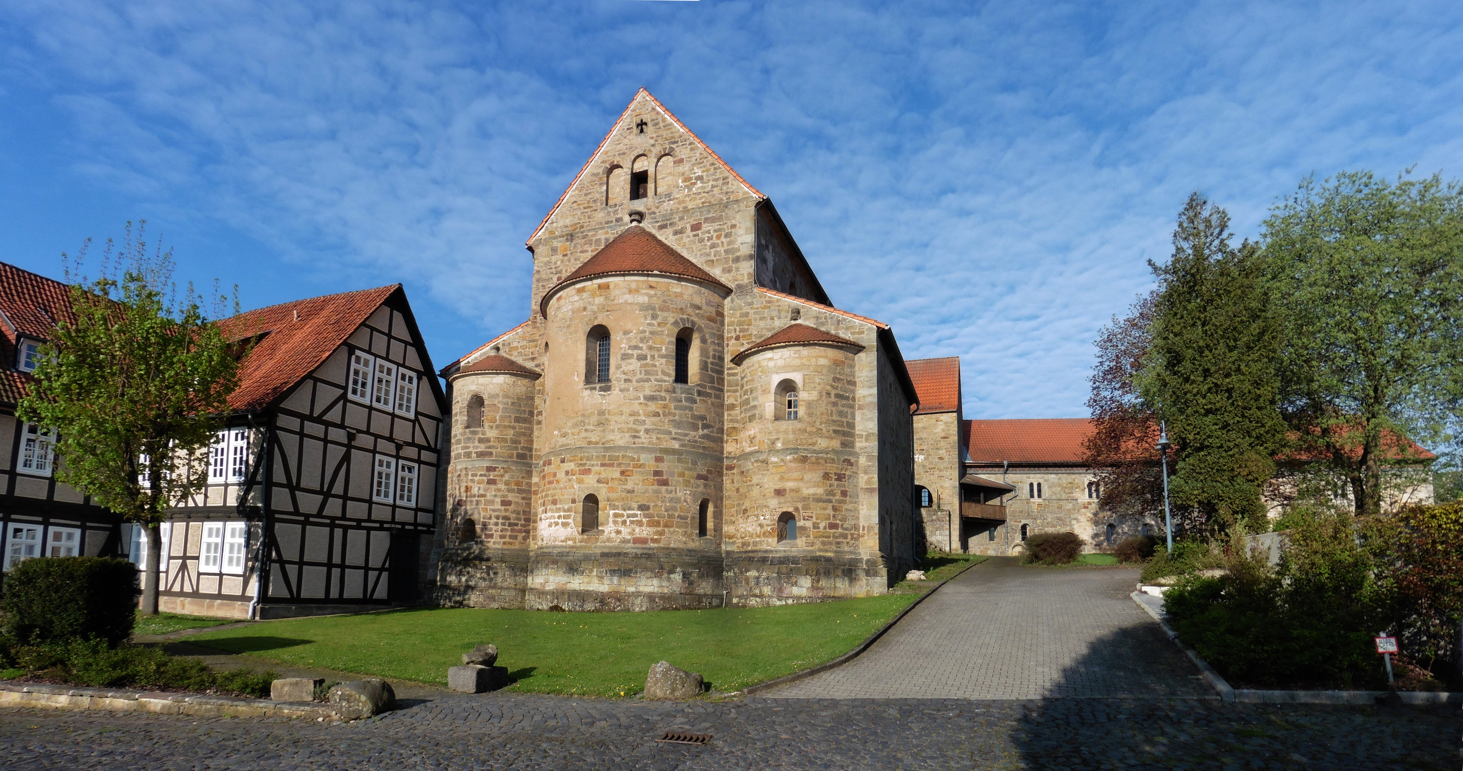 Ehemaliges Kloster Germerode in der Gemeinde Meißner im Werra-Meißner-Kreis, Nordhessen. Ansicht von Osten.